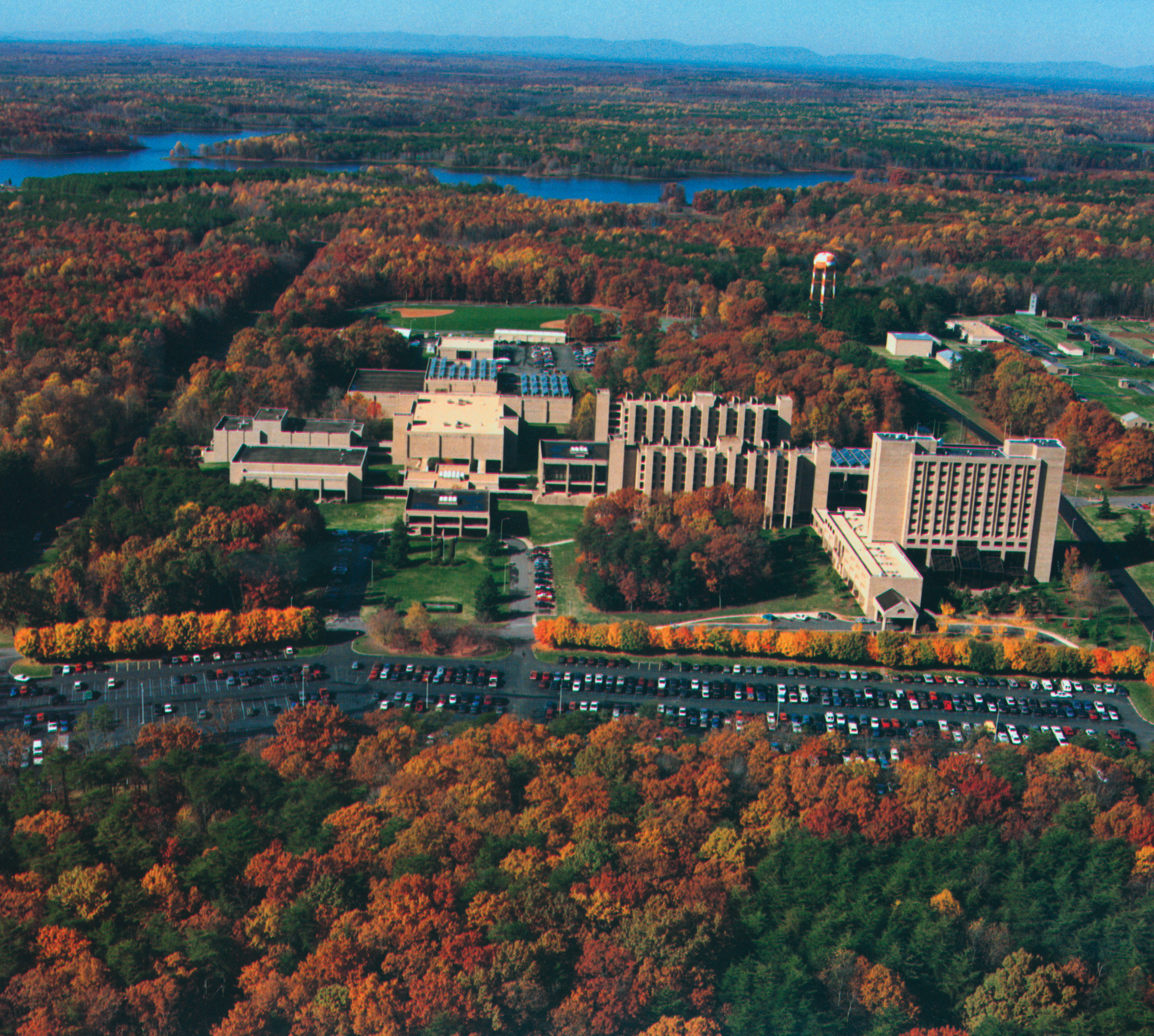 FBI Academy.